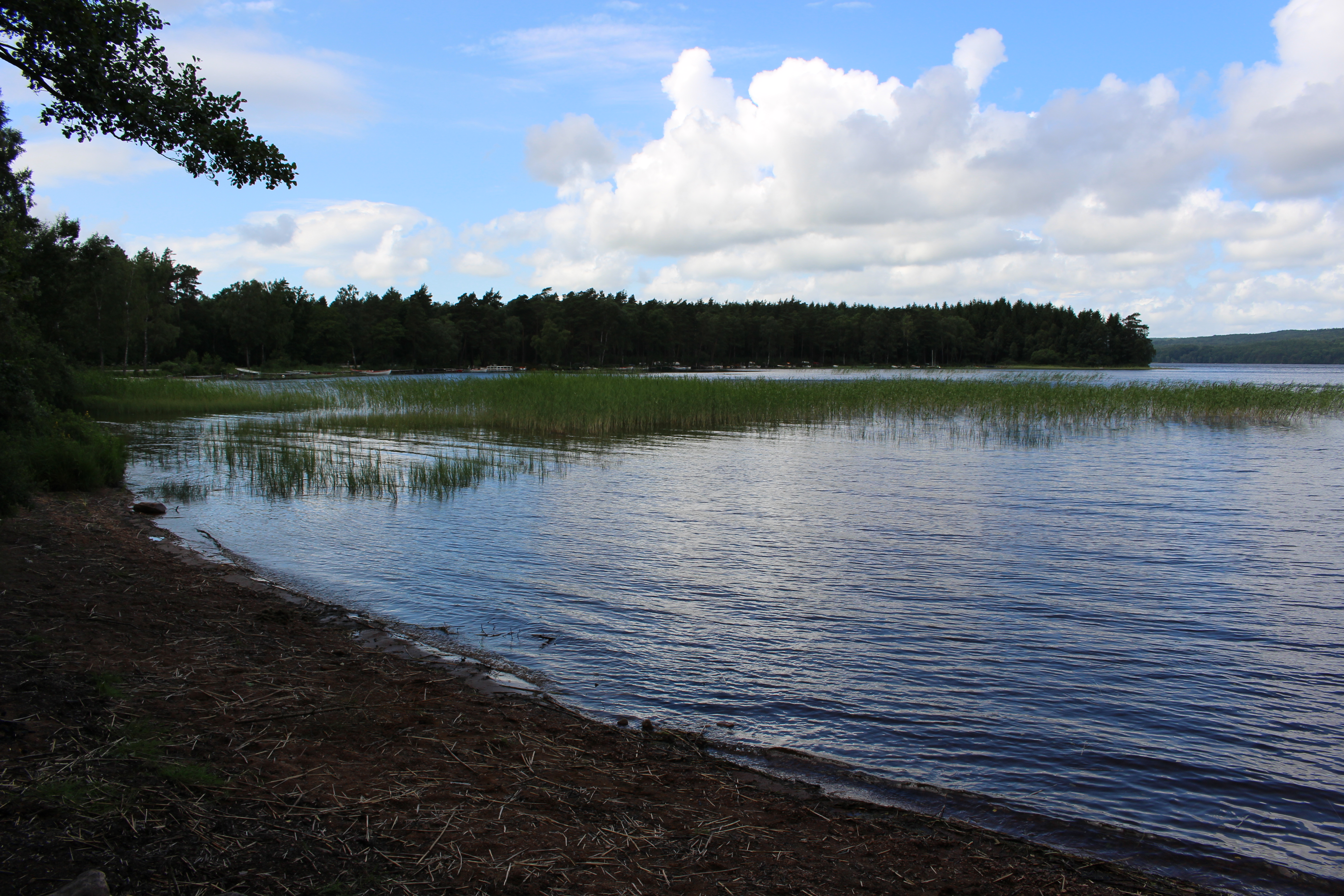 Västersjön från södra sidan. Vy mot nordväst.